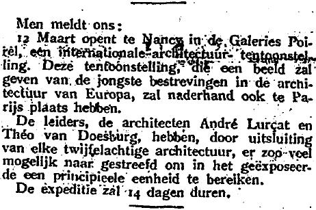 Anoniem (8 maart 1926) 'Men meldt ons: [...]', Het Vaderland, Avondblad B, [p. 1].